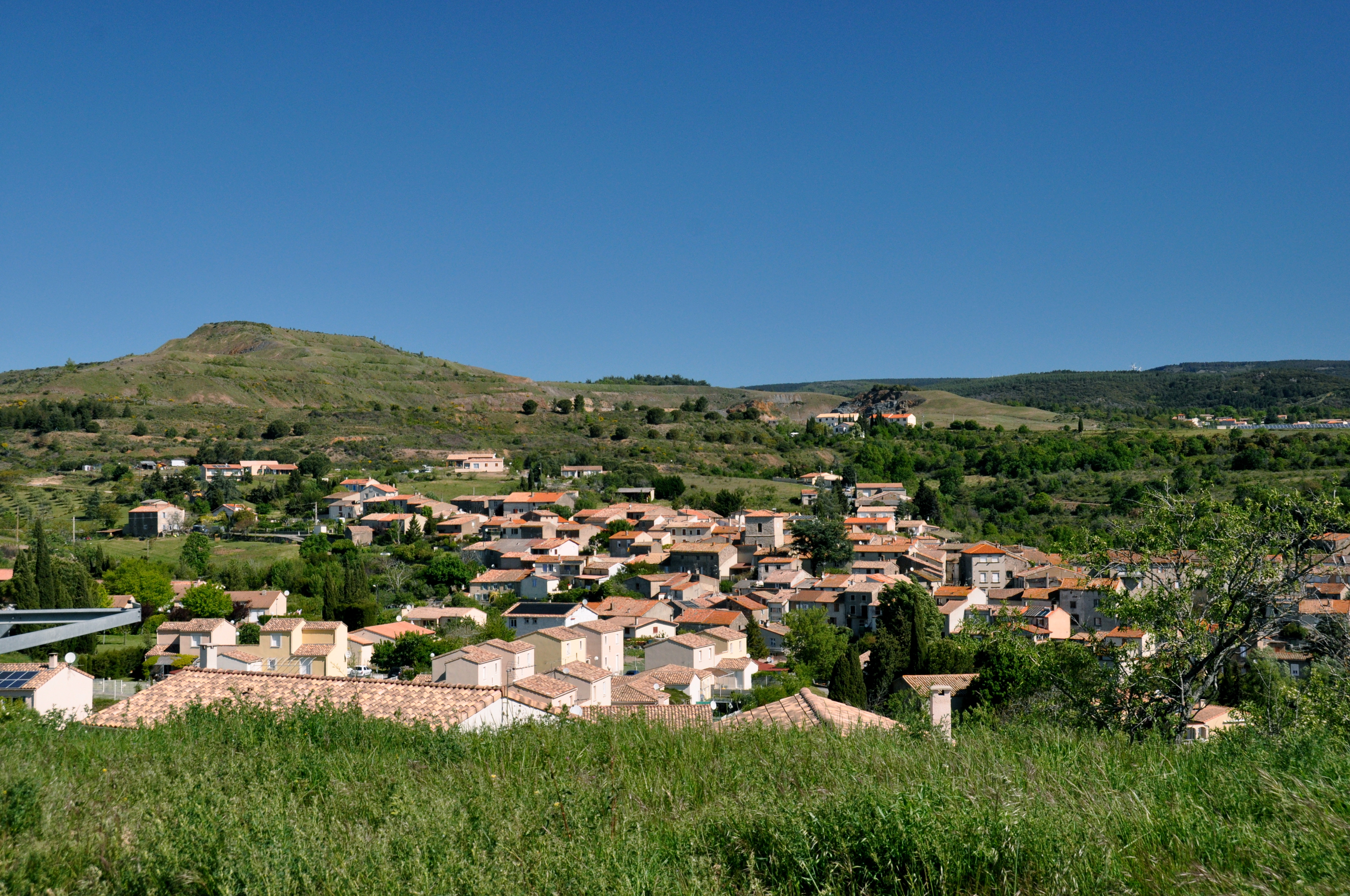 Vue générale du village de Salsigne